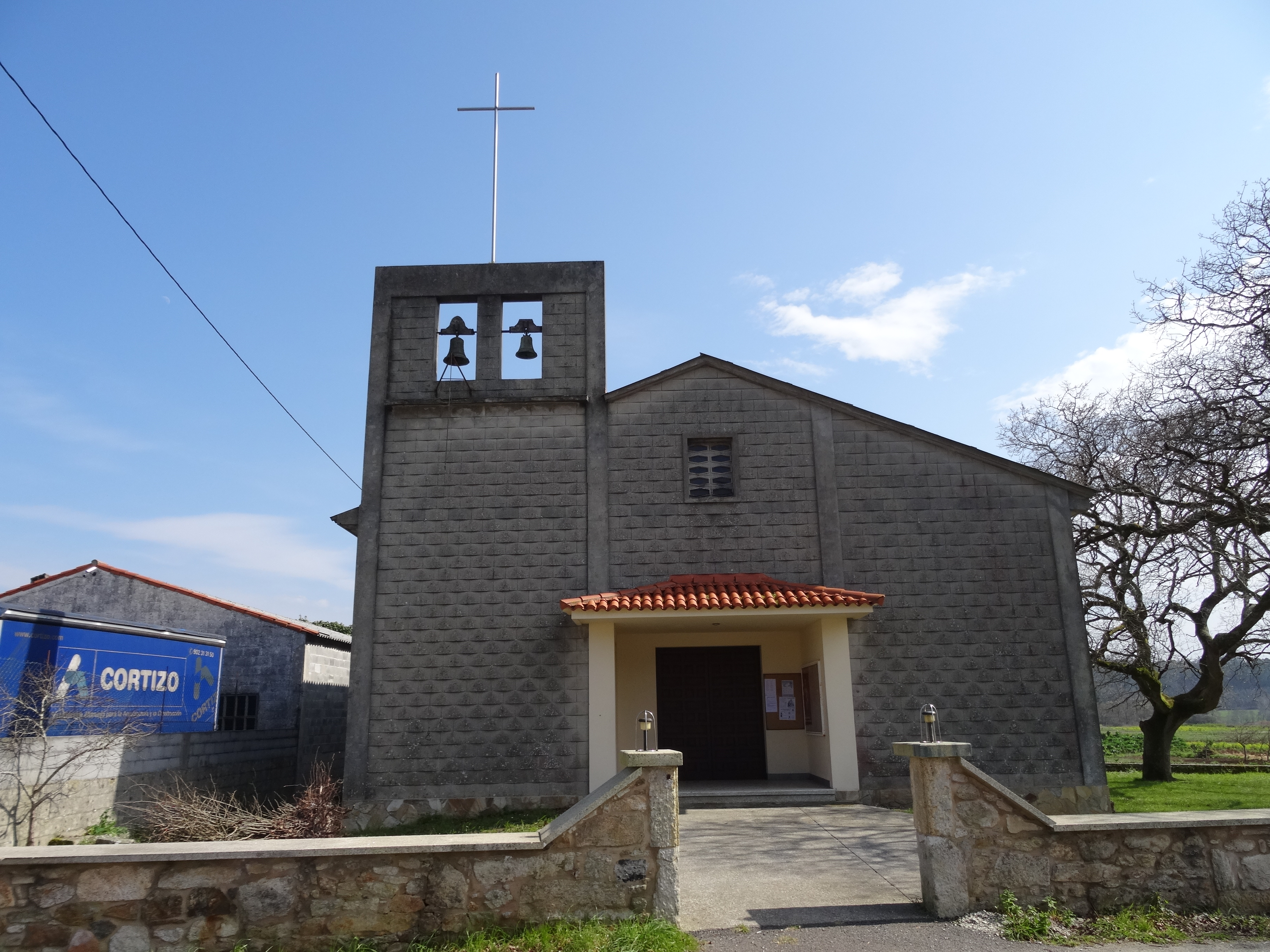 Igrexa de San Martiño de Cances, Carballo.